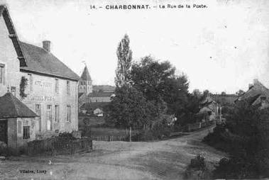 Carte postale représentant la commune de Charbonnat (France)